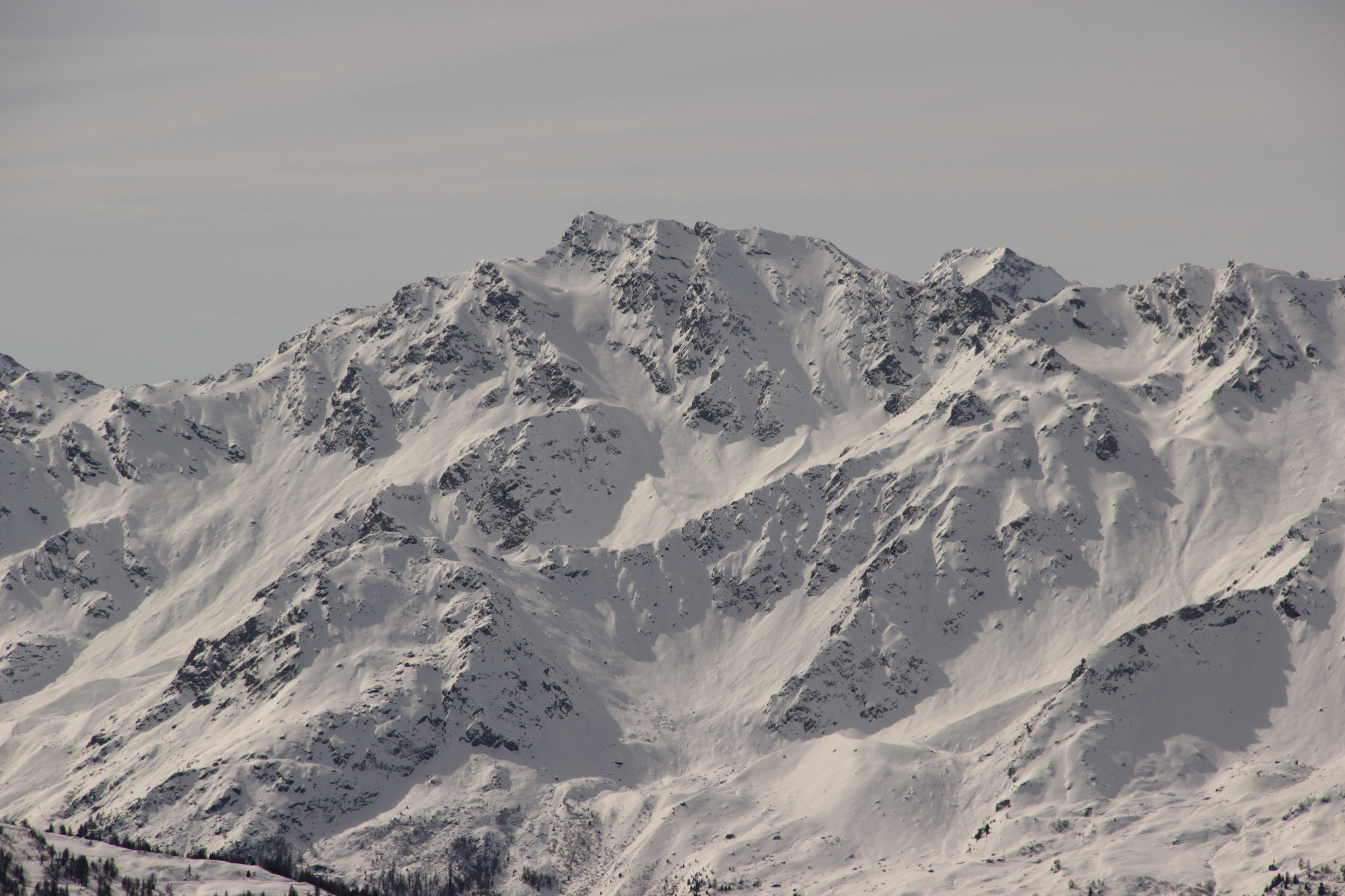 Le Metailler